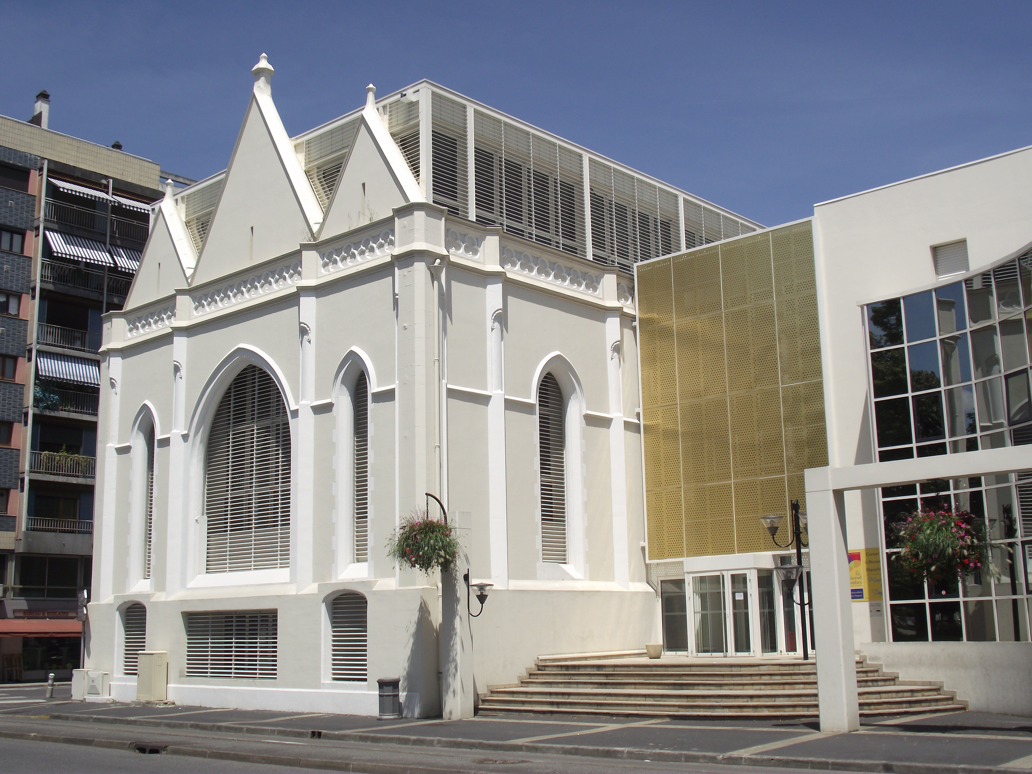 Conservatoire Henri Duparc (Tarbes, Hautes-Pyrénées, France)